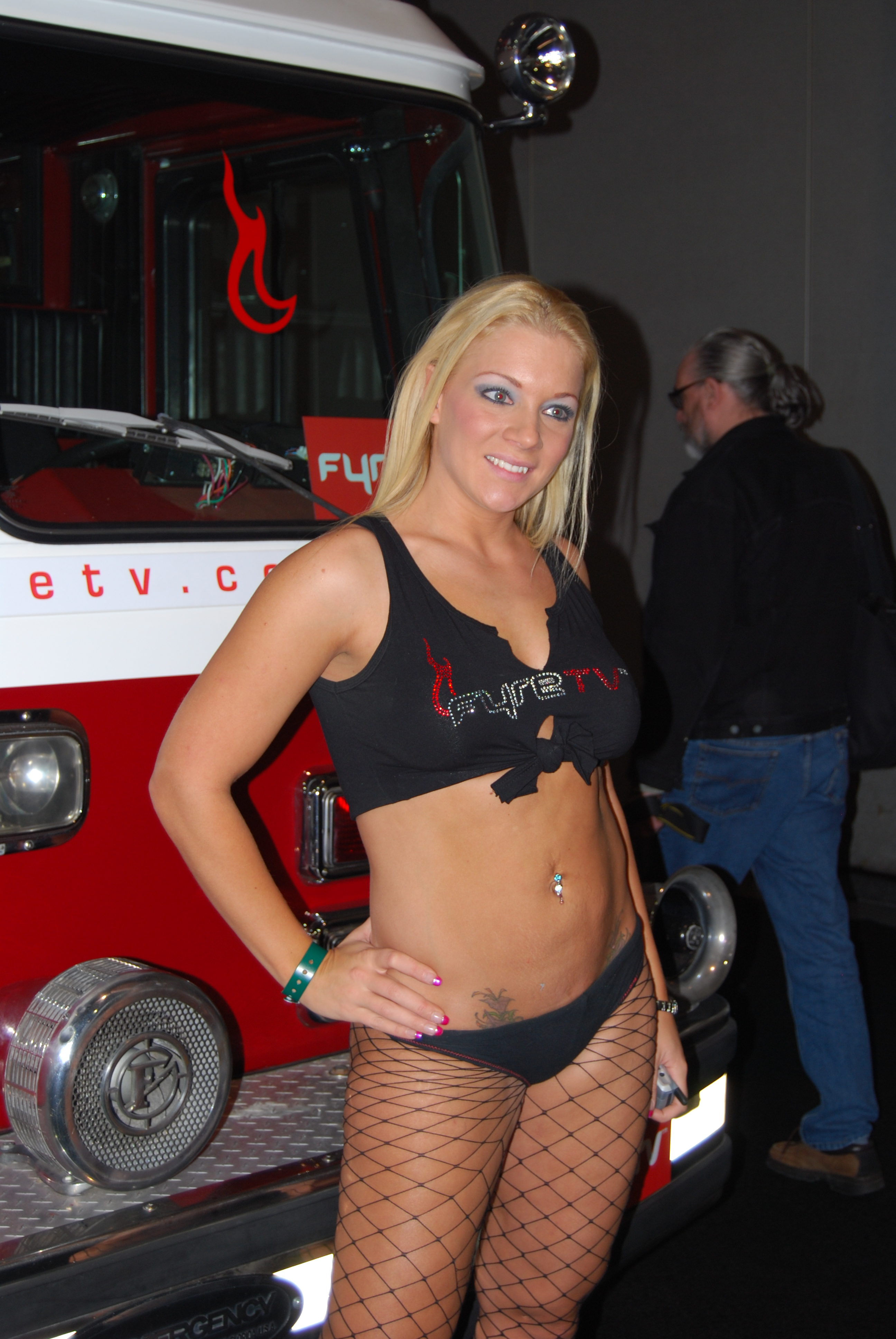 Heidi Mayne